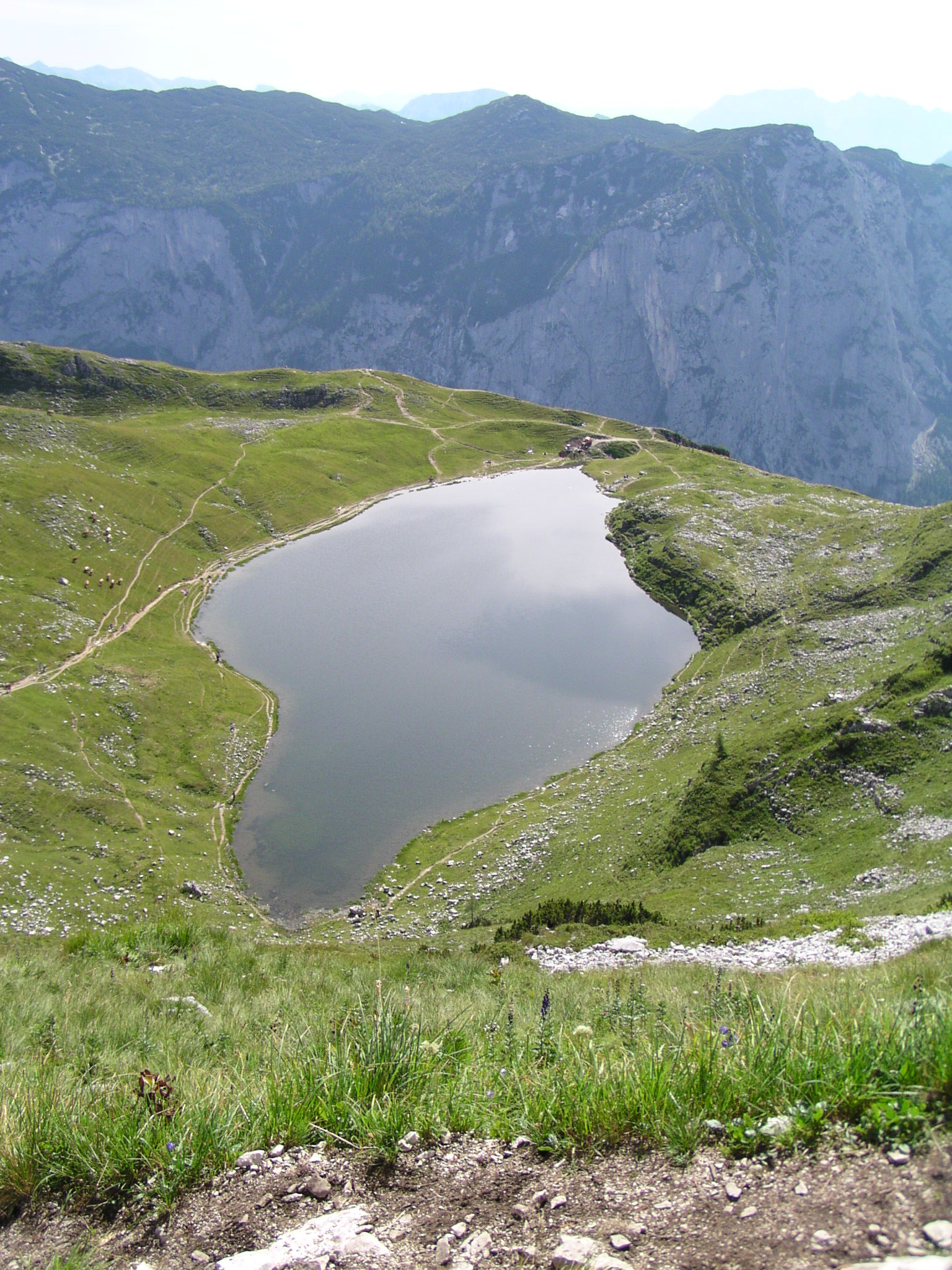 Blick auf den Augstsee im Ausseerland, Österreich